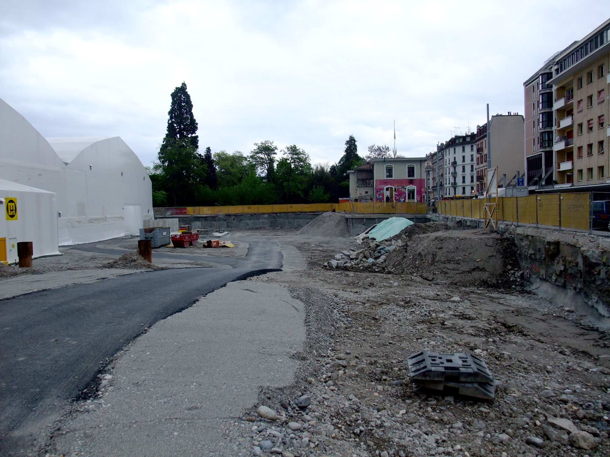 Genève, Artamis, ancien site industriel devenu espace culturel autogéré en 1996. Etat des travaux de réaménagement en mai 2010.